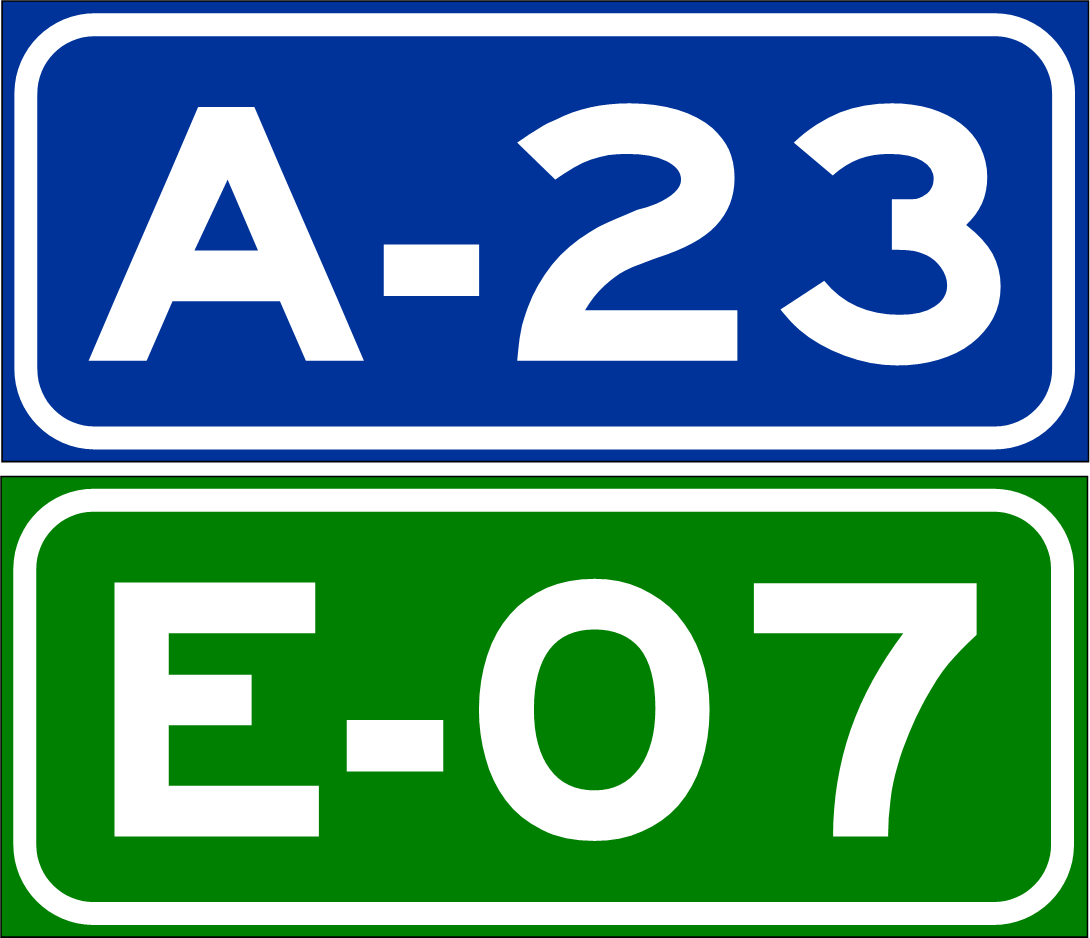 Indicador de la autovia A-23 en España, con el indicador de la ruta europea.